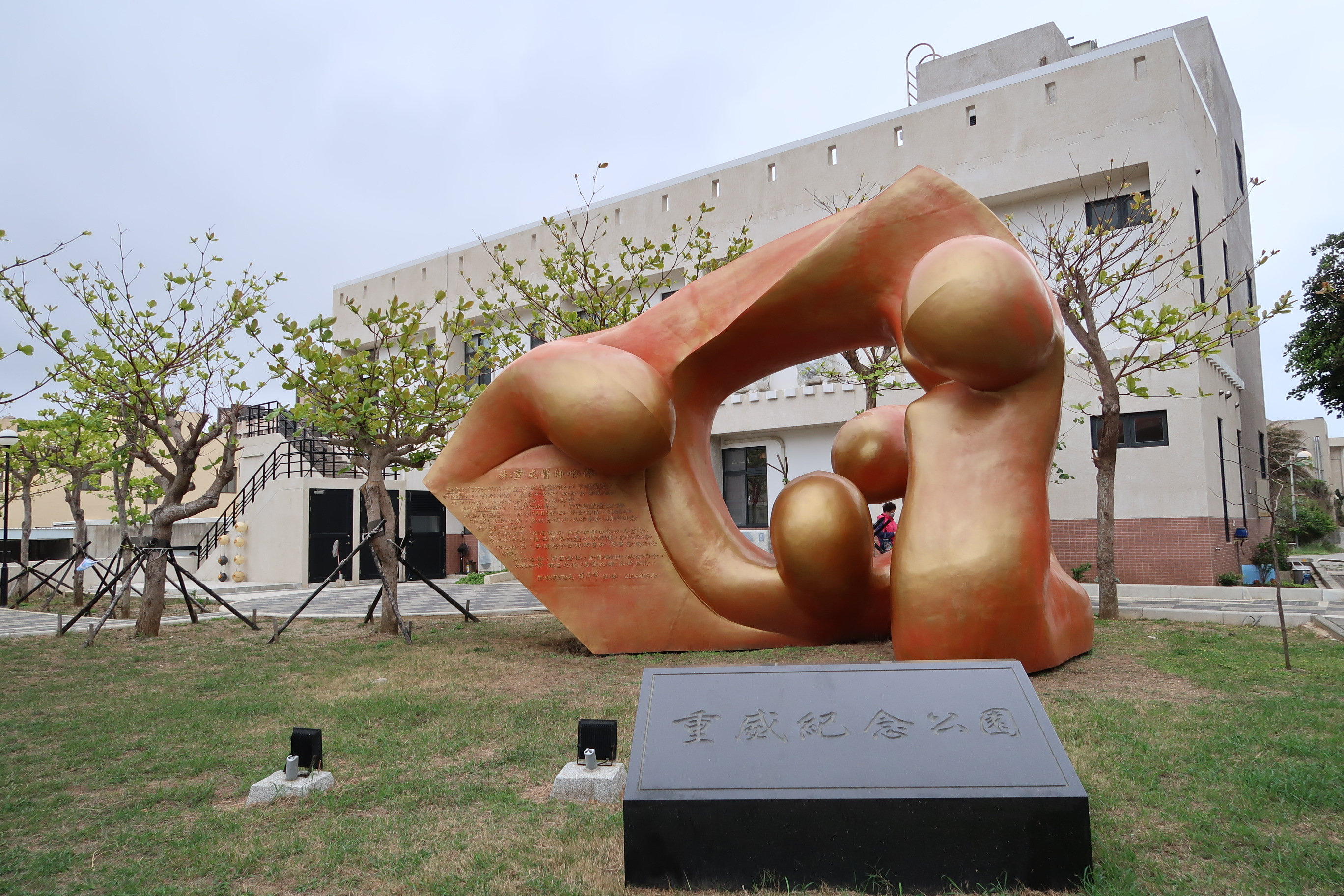 位於台灣澎湖縣馬公市朝陽里。紀念2003年於前線醫治SARS而染病殉職的醫師林重威。